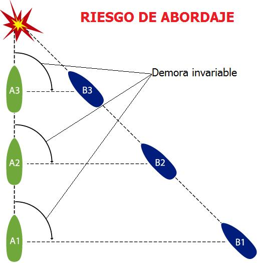 Regla 7 el RIPA